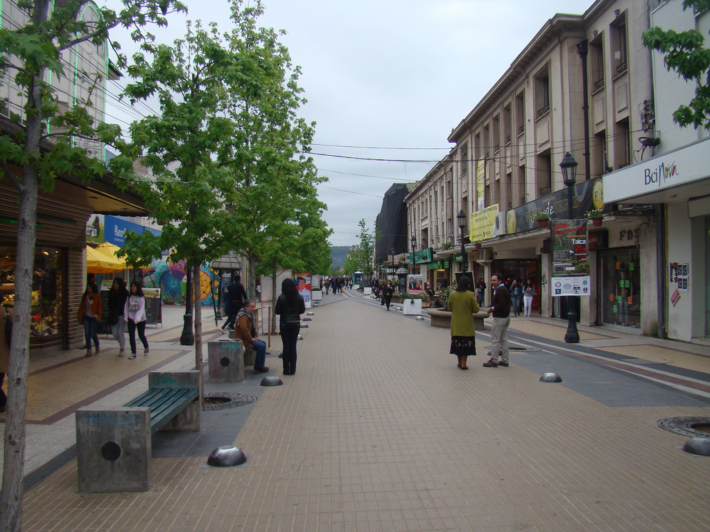 Peatonal en la calle 1 Sur.